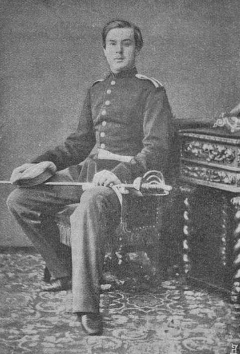 Скобелев юнкером.